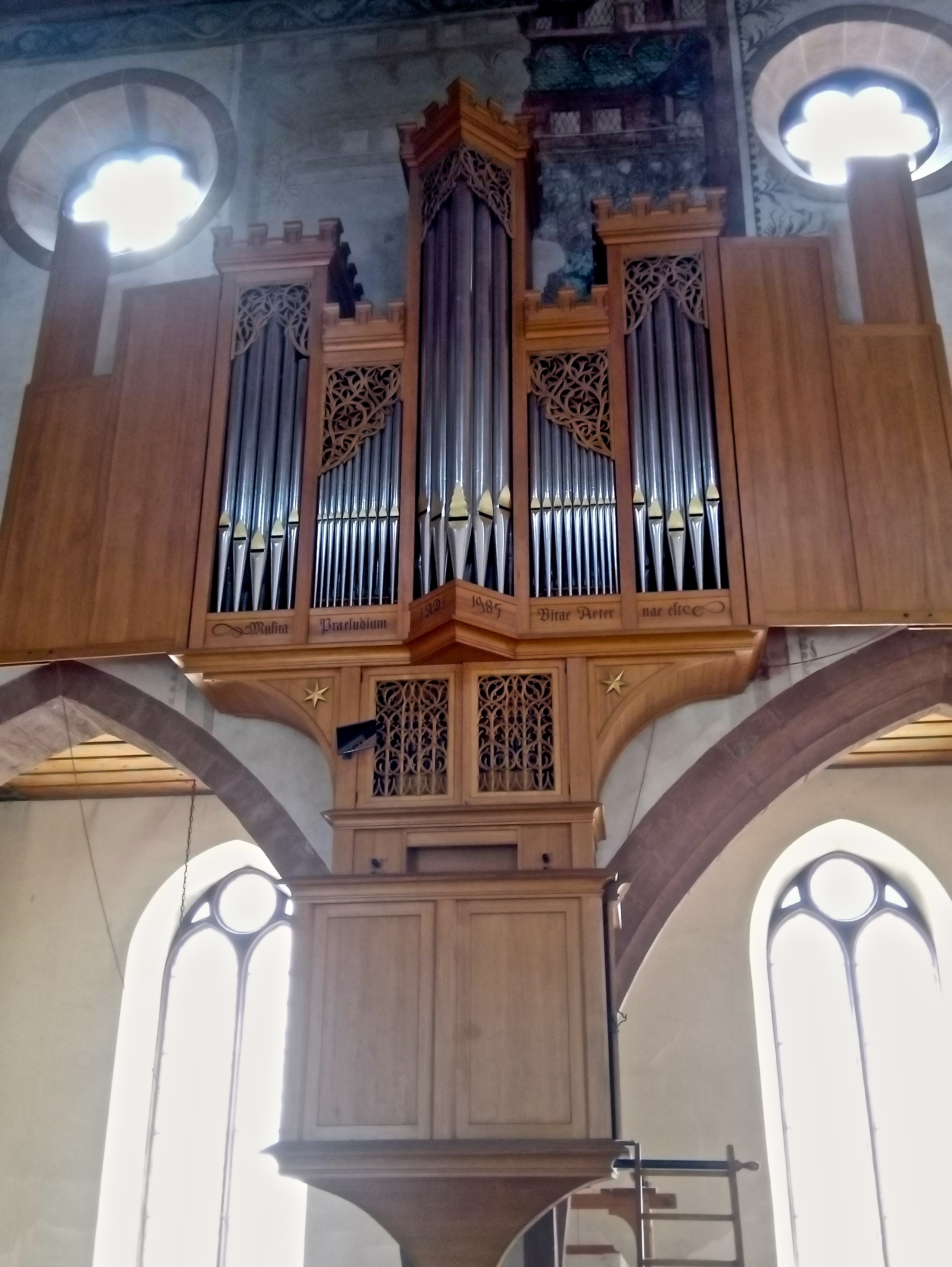 Schwalbennestorgel im Stile der Renaissance in der Predigerkirche Basel